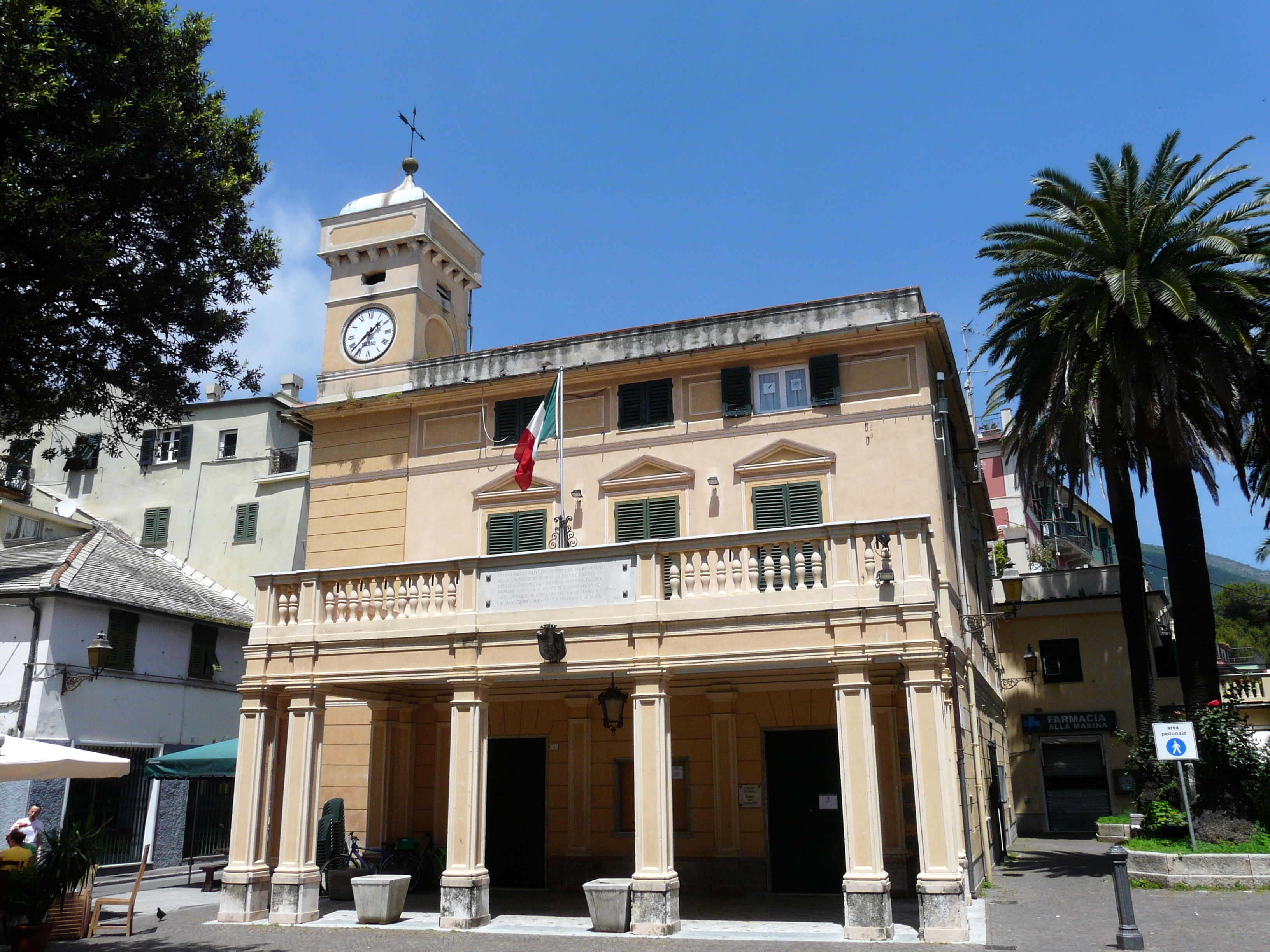 La sede della Torre dei Saraceni, Arenzano, Liguria, Italia